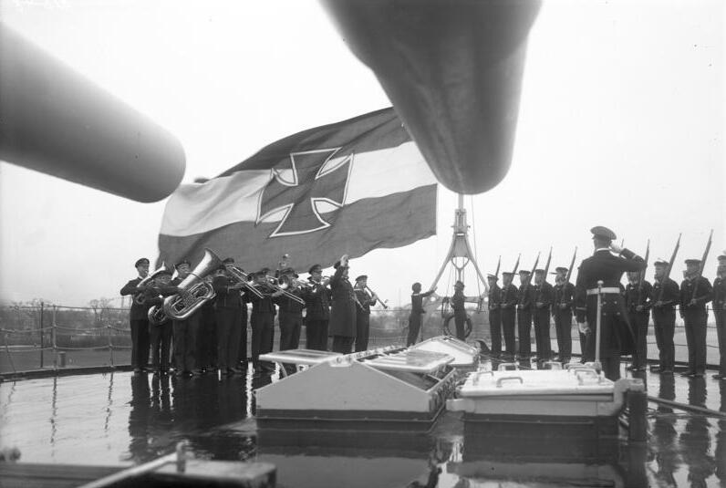 Die ersten grossen diesjährigen Manöver unserer Reichsmarine in der Ostsee ! Flaggenparade an Bord des grössten deutschen Schlachtschiffes "Schleswig-Holstein". Blick durch die Geschütze während des feierlichen Hissens der deutschen Kriegsflagge am Heck der "Schleswig-Holstein".